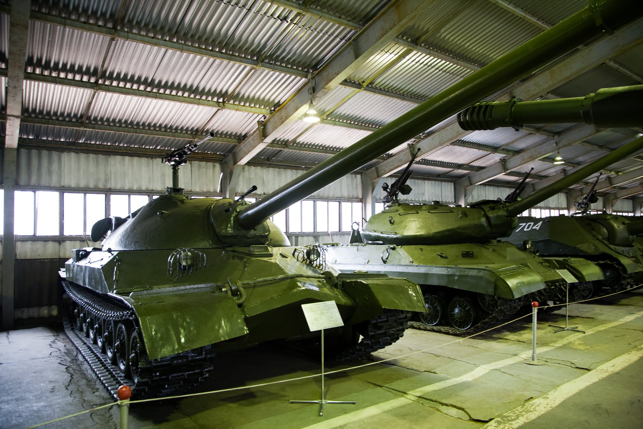 Тяжёлый танк ИС-7 в Бронетанковом музее г. Кубинка.